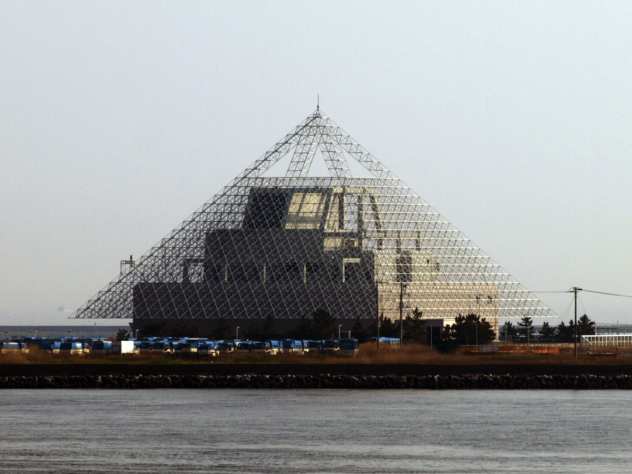 浮島換気口